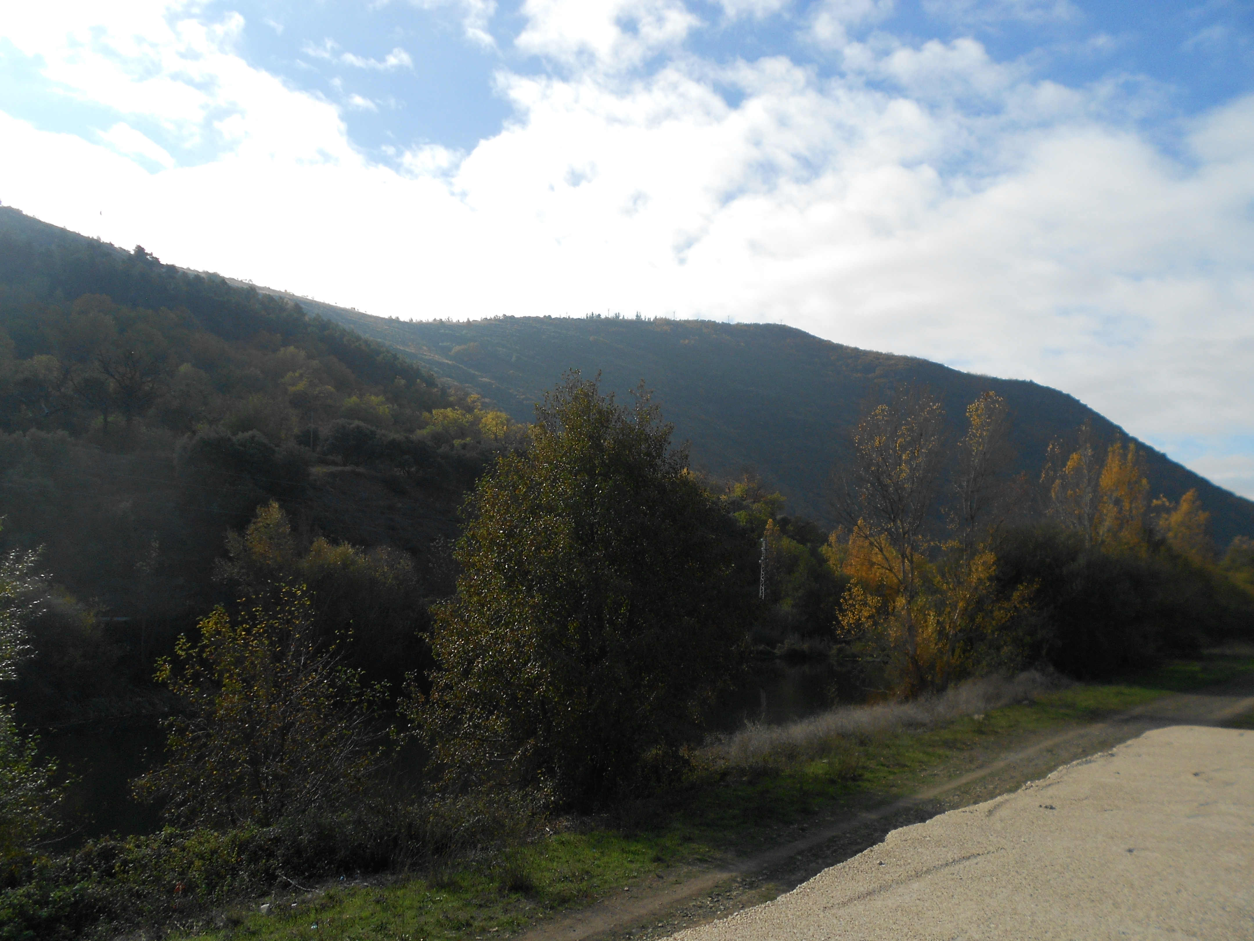 Monte Pajariel visto desde Ponferrada